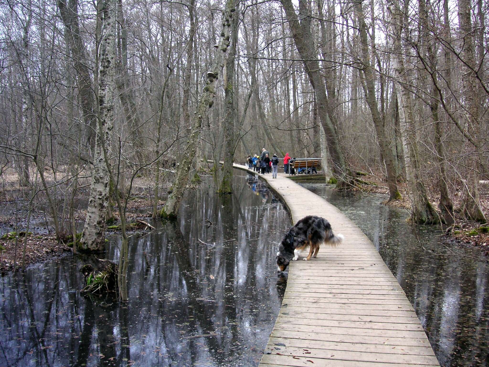 Kyrksjön i Bromma